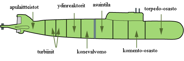 Kursk-sukellusveneen kaavio suomennettuna.